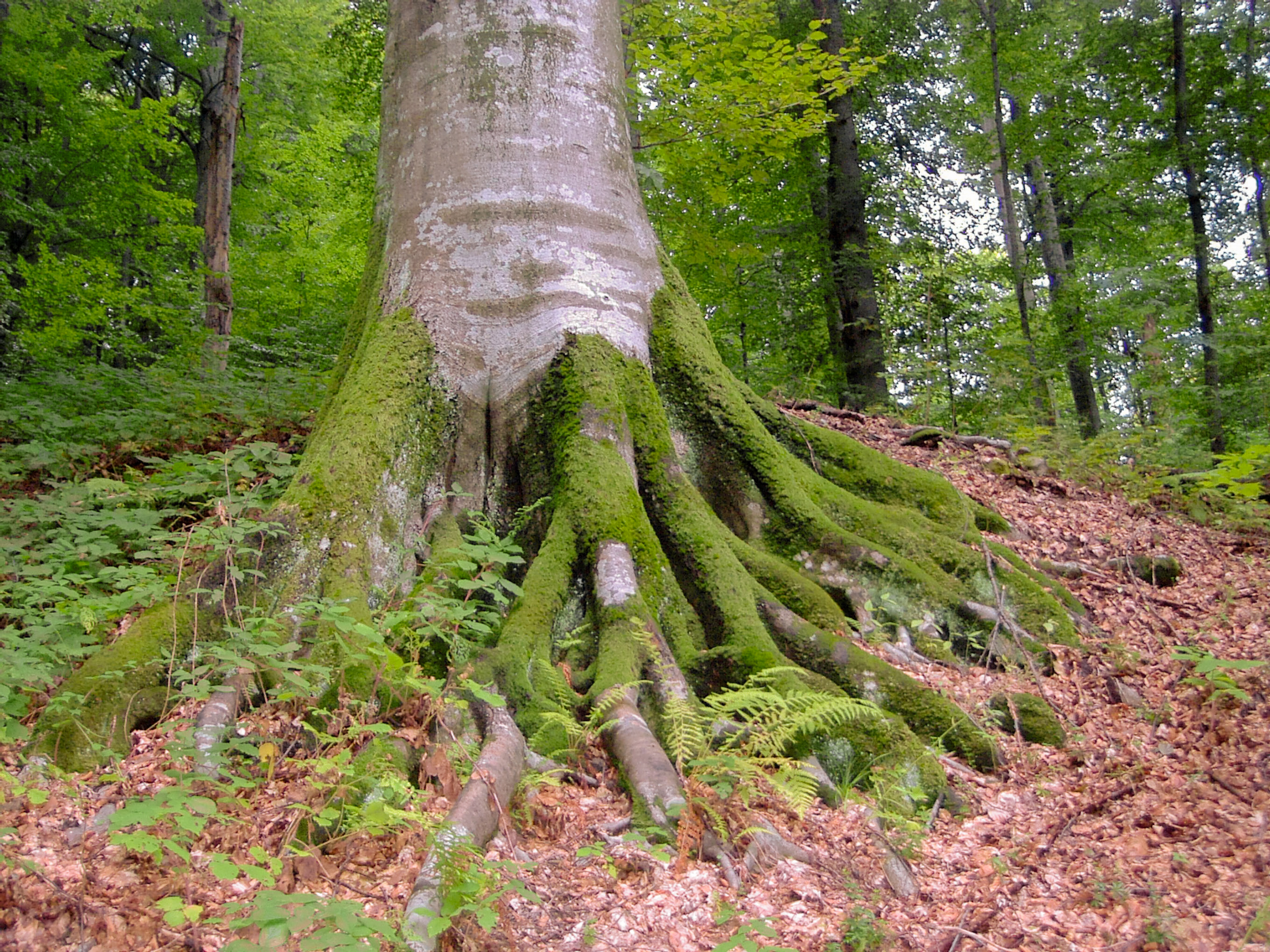 Dicke Buche (Fagus sylvatica), die sich mit ausladenden Wurzeln im Hang verankert hat. Buchen-Urwald Uholsko-Sherokyi-Luh in der Ukraine, weltgrößter Rotbuchen-Urwald.